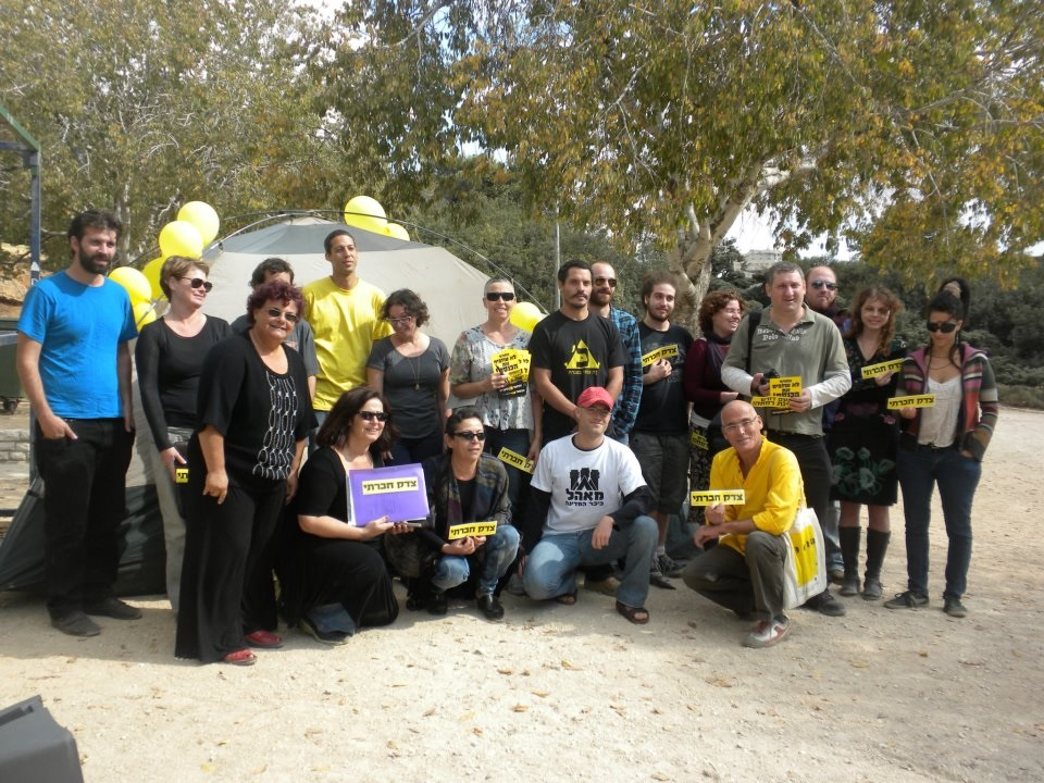 חנה קים בהפגנת המשמר החברתי בכנסת